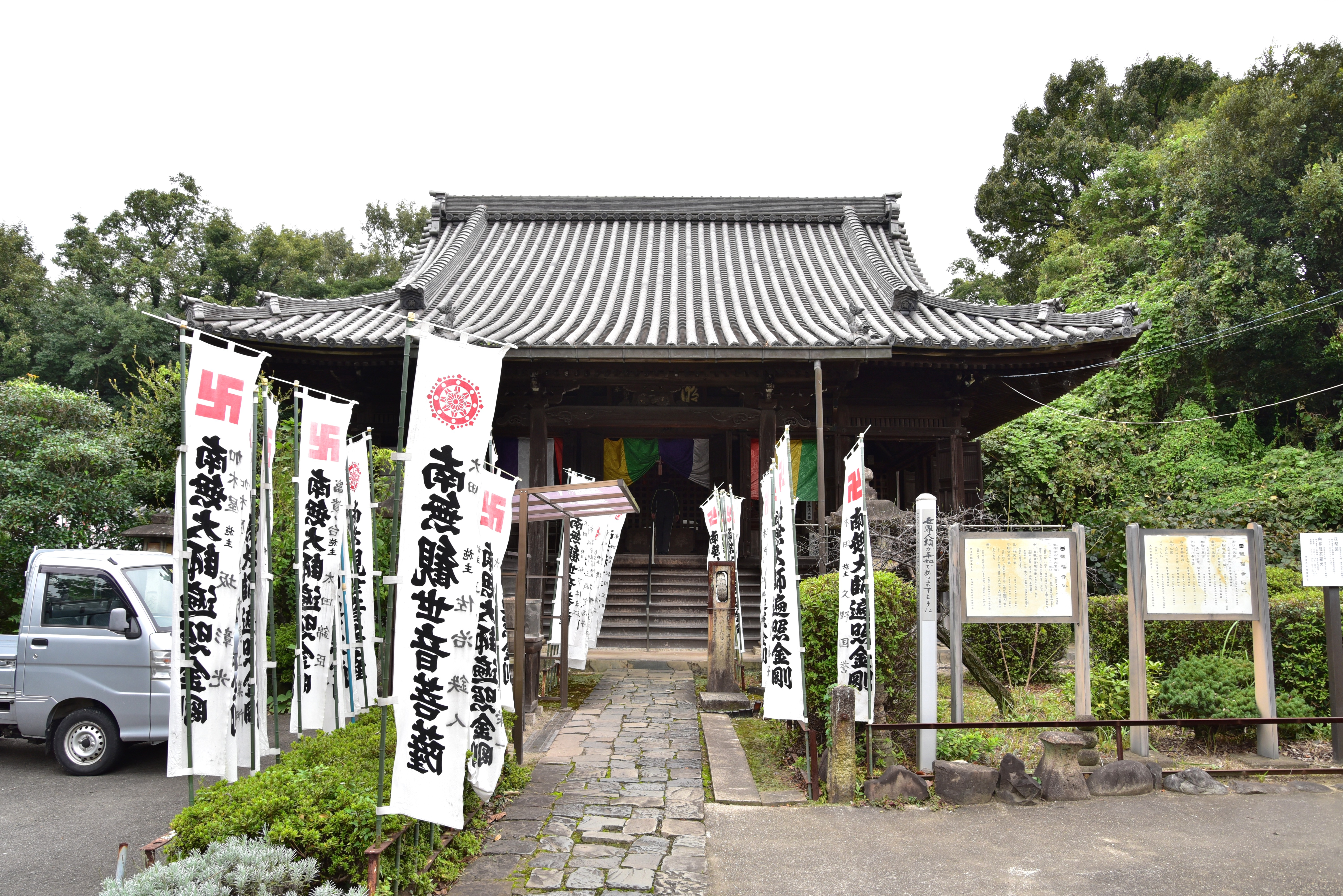 観福寺本堂